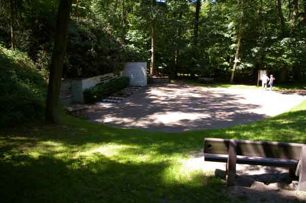 Gedenkstätte für Opfer der Nazi-Herrschaft. Regelmäßige Gedenkfeiern durch Langenfeld, Solingen, Remscheid, Wuppertal und den DGB ausgerichtet.